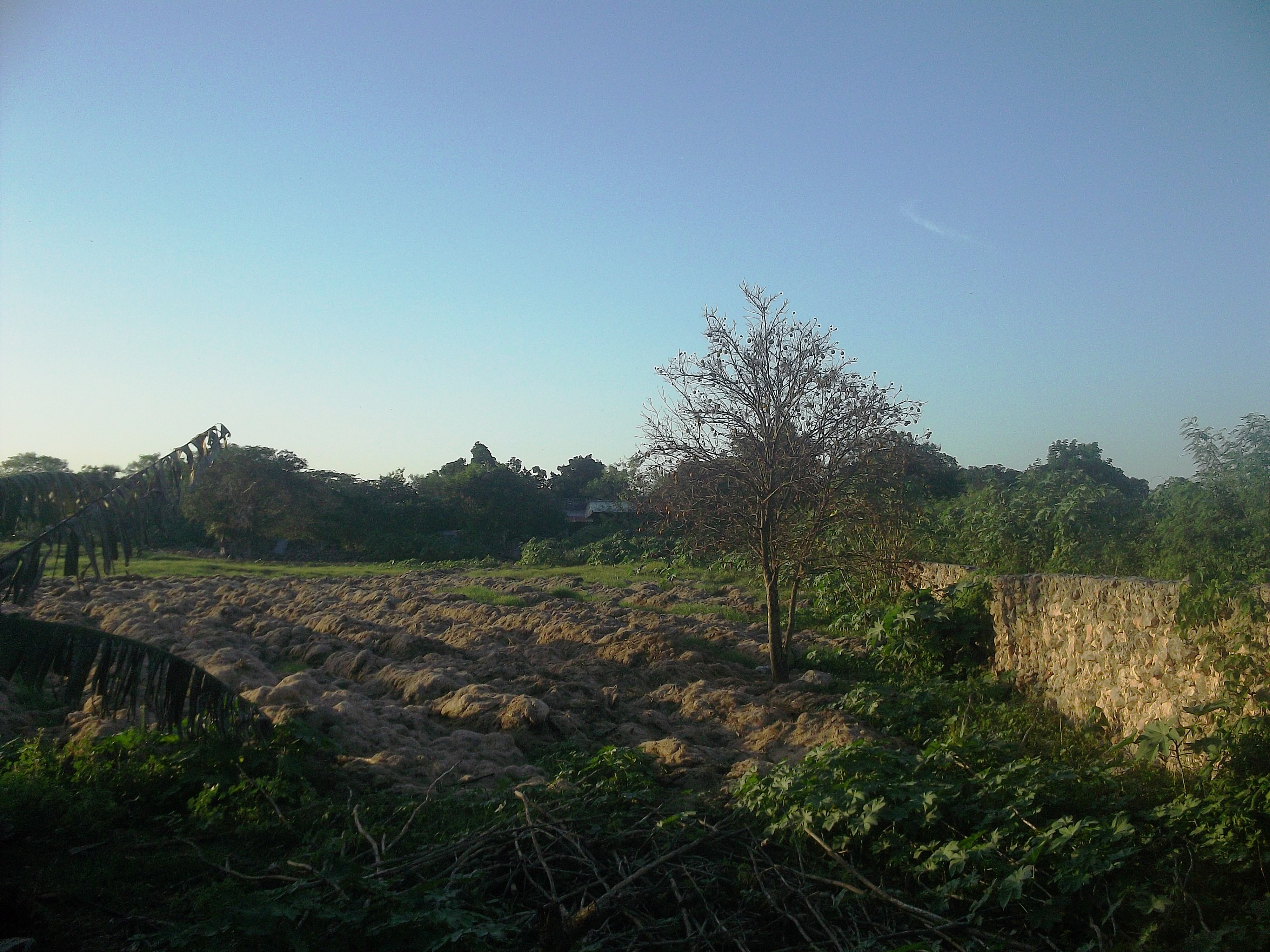 Vista de Xcehus, Yucatán.